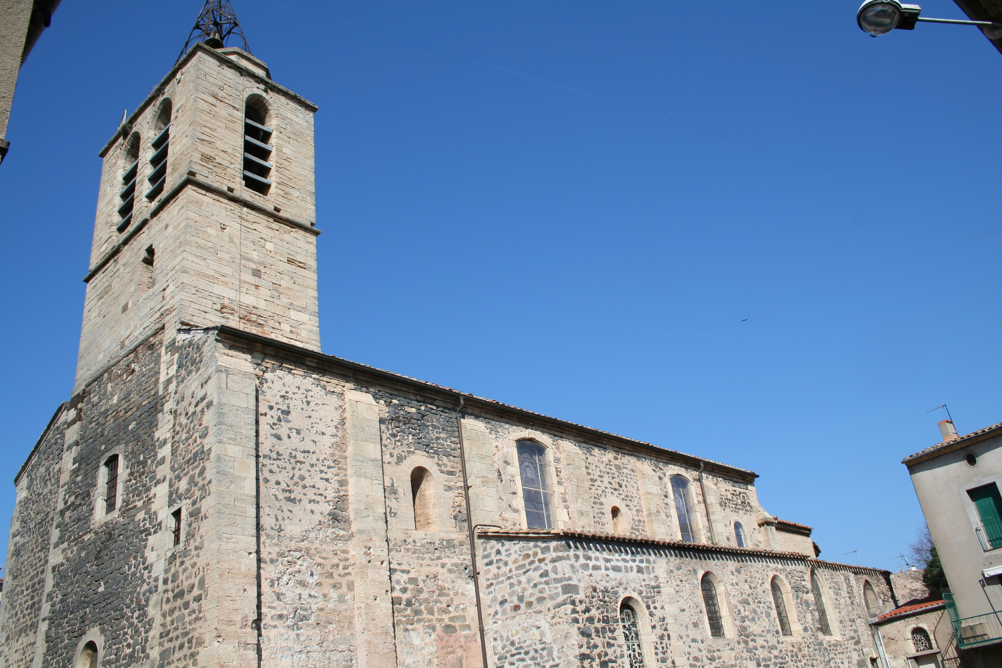 Bessan (Hérault) - église Saint-Pierre-es-Liens.